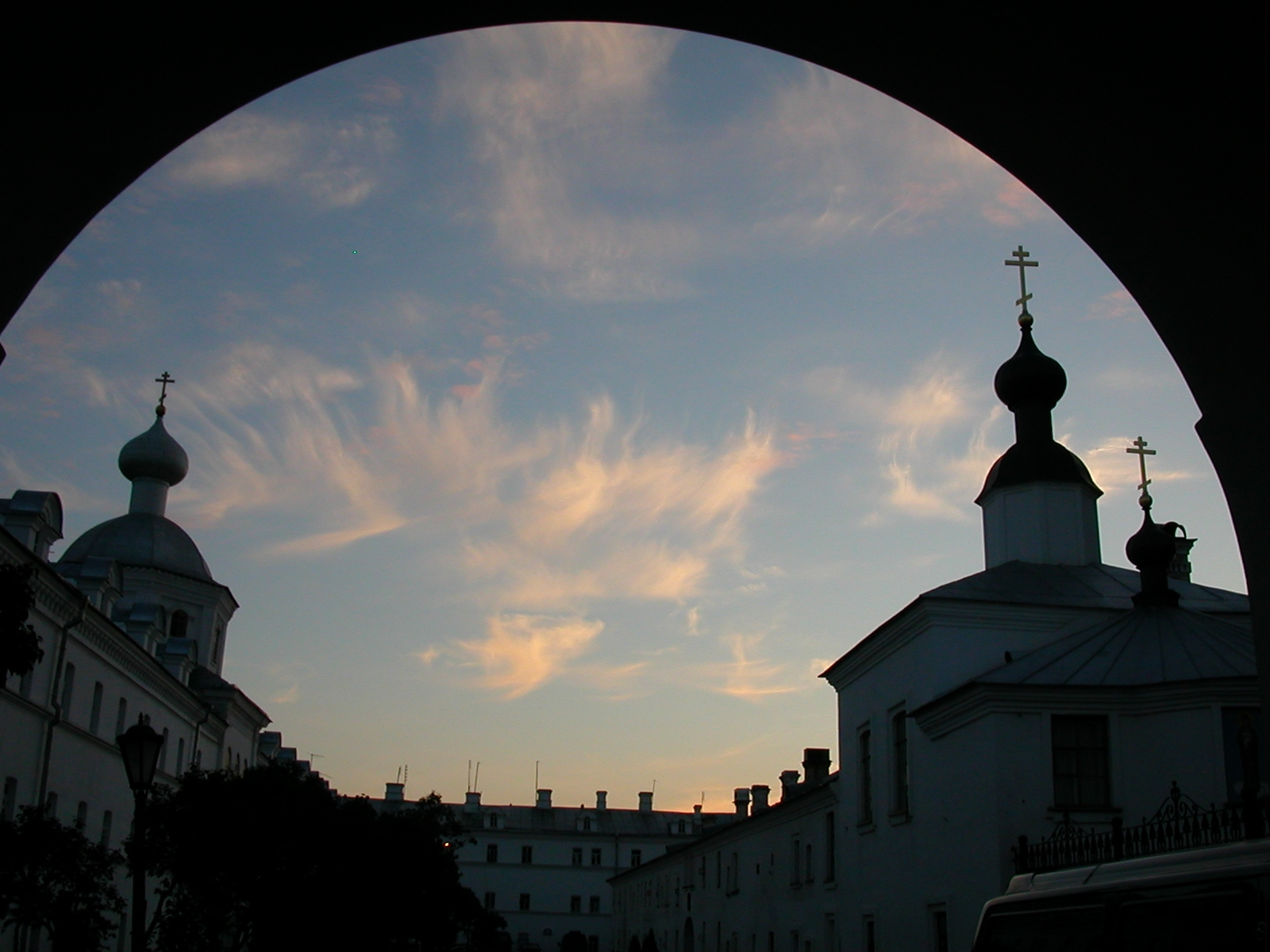 Монастырь Валаамский Спасо-Преображенский. Внутреннее и внешнее каре центральной усадьбы. Церковь Петра и Павла. Церковь валаамской иконы Божией Матери. (Республика Карелия, Сортавала, о. Валаам)